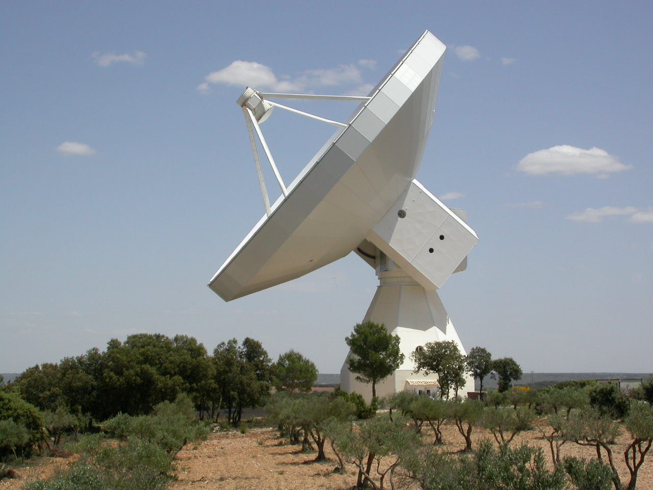 Fotografía del radiotelescopio de 40m de diámetro del Observatorio Astronómico Nacional en Yebes. [1]